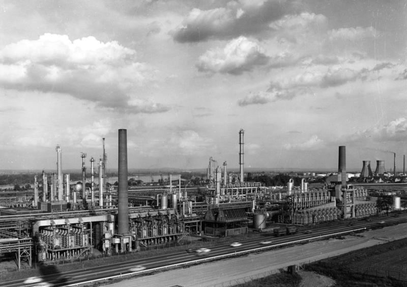 1966/1967 Rheinische Olefinwerke in Wesseling/Köln